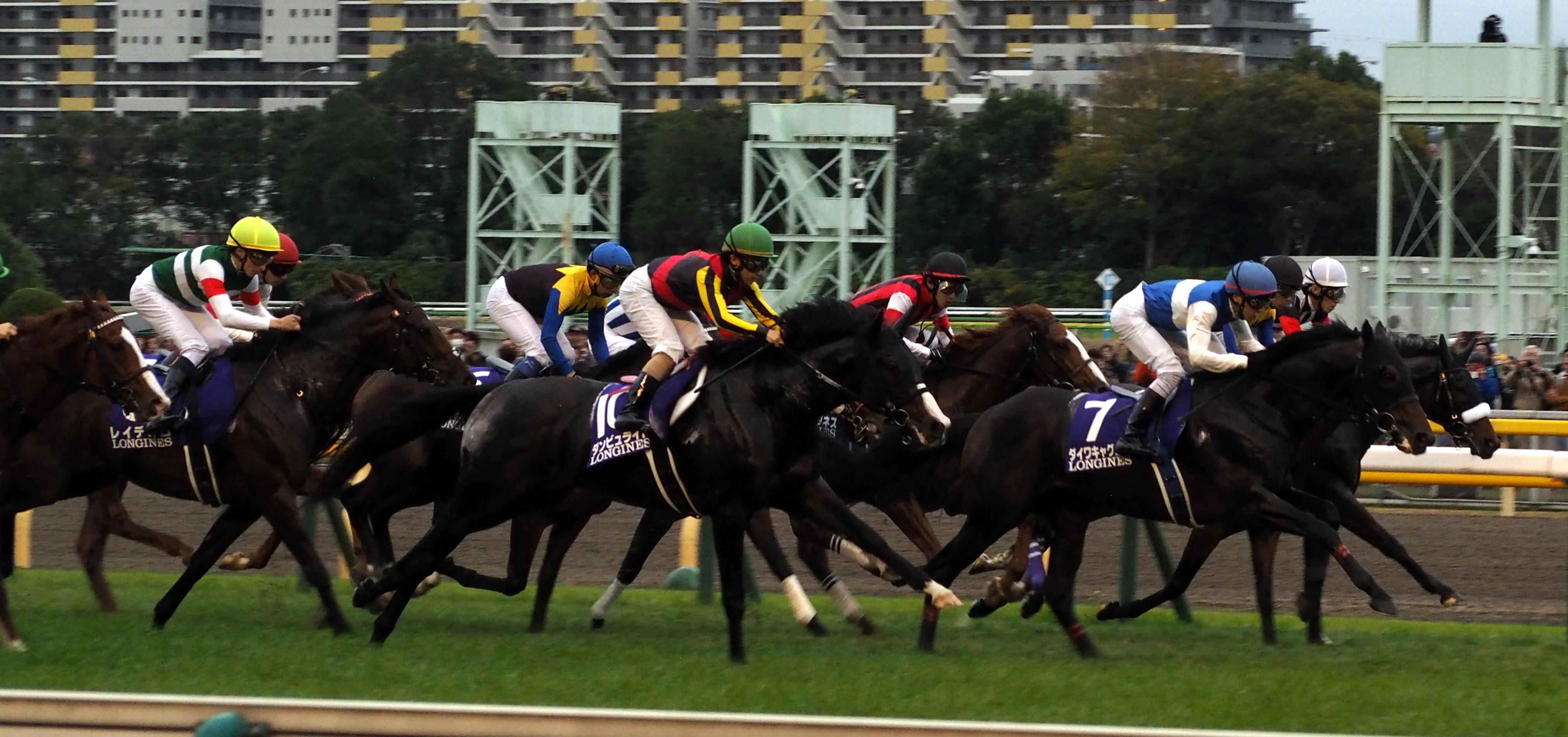 2019年のジャパンカップ スタート後の先行争い